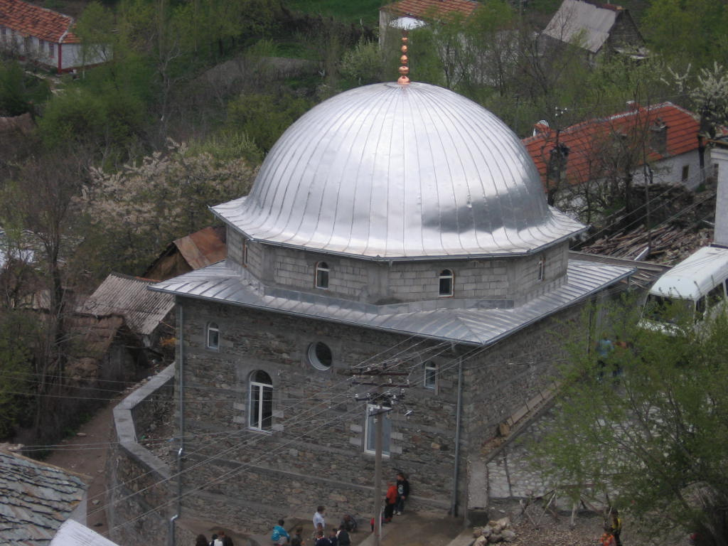 Xhamia e fshatit Borje ndertuar pas viteve 90